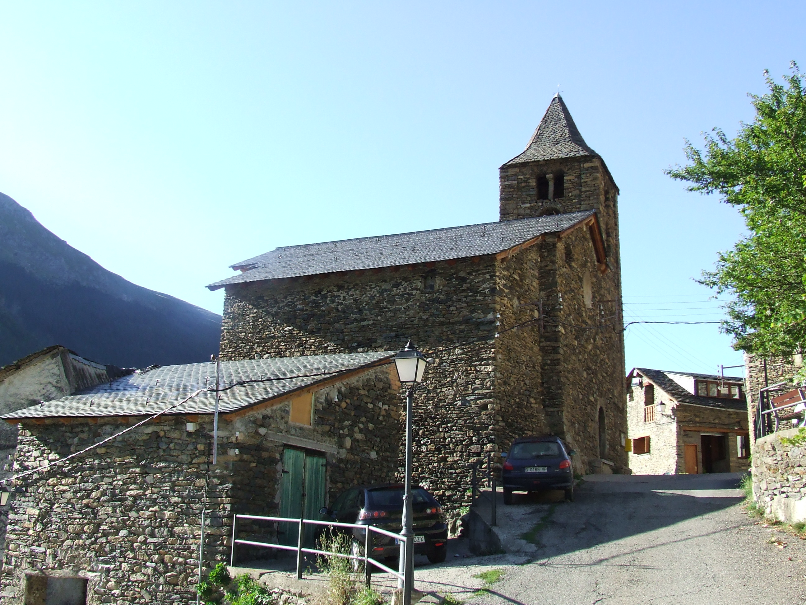 L'església d'Espui (la Torre de Cabdella, Pallars Jussà)